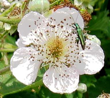 Ein Käfer der Gattung Familie Oedemeridae an einer Brombeerblüte